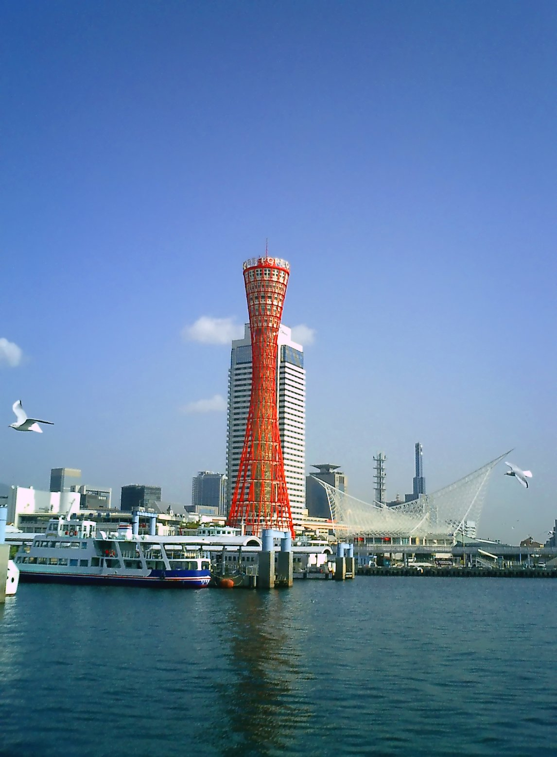 Kobe-meriken-park-port-tower